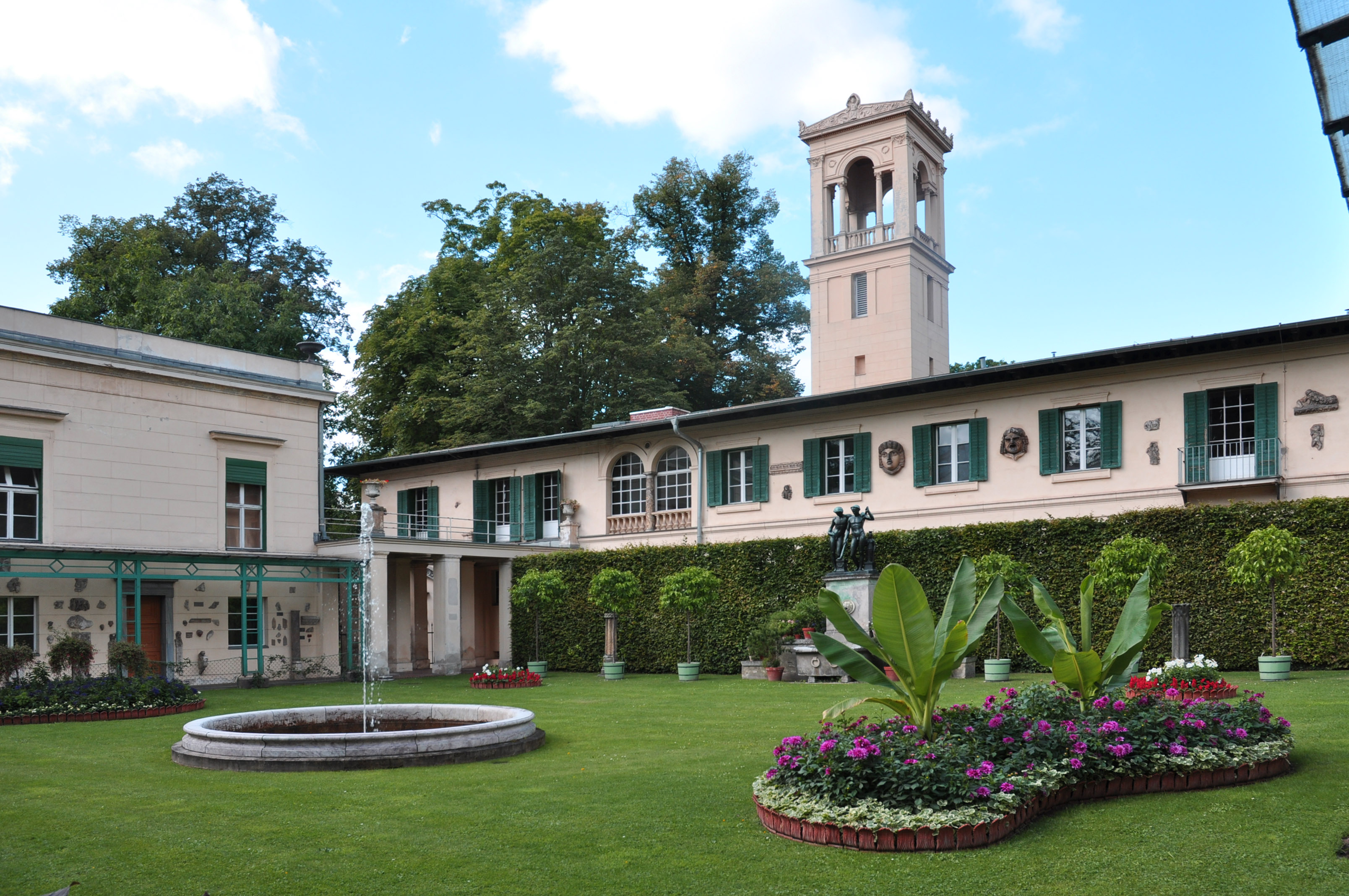 Park Klein-Glienicke, Gartenhof nach Nordwest